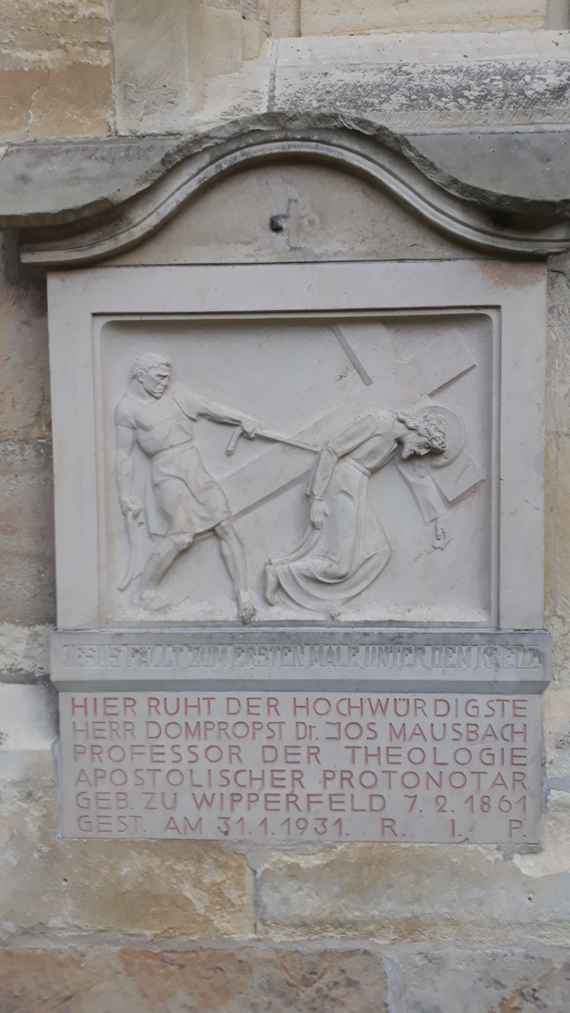 Das Grab des deutschen Theologen, Priesters und Politikers Joseph Mausbach im Kreuzgang des Doms zu Münster.